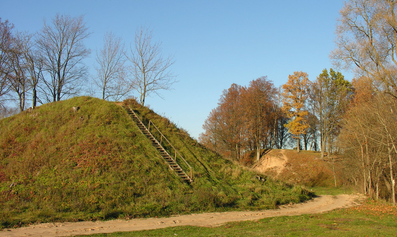 Daubarių piliakalniai (arčiau antrasis, toliau - pirmasis (didesnysis), Mažeikių raj. Foto: Algirdas, 2005 m. spalio 31 d.